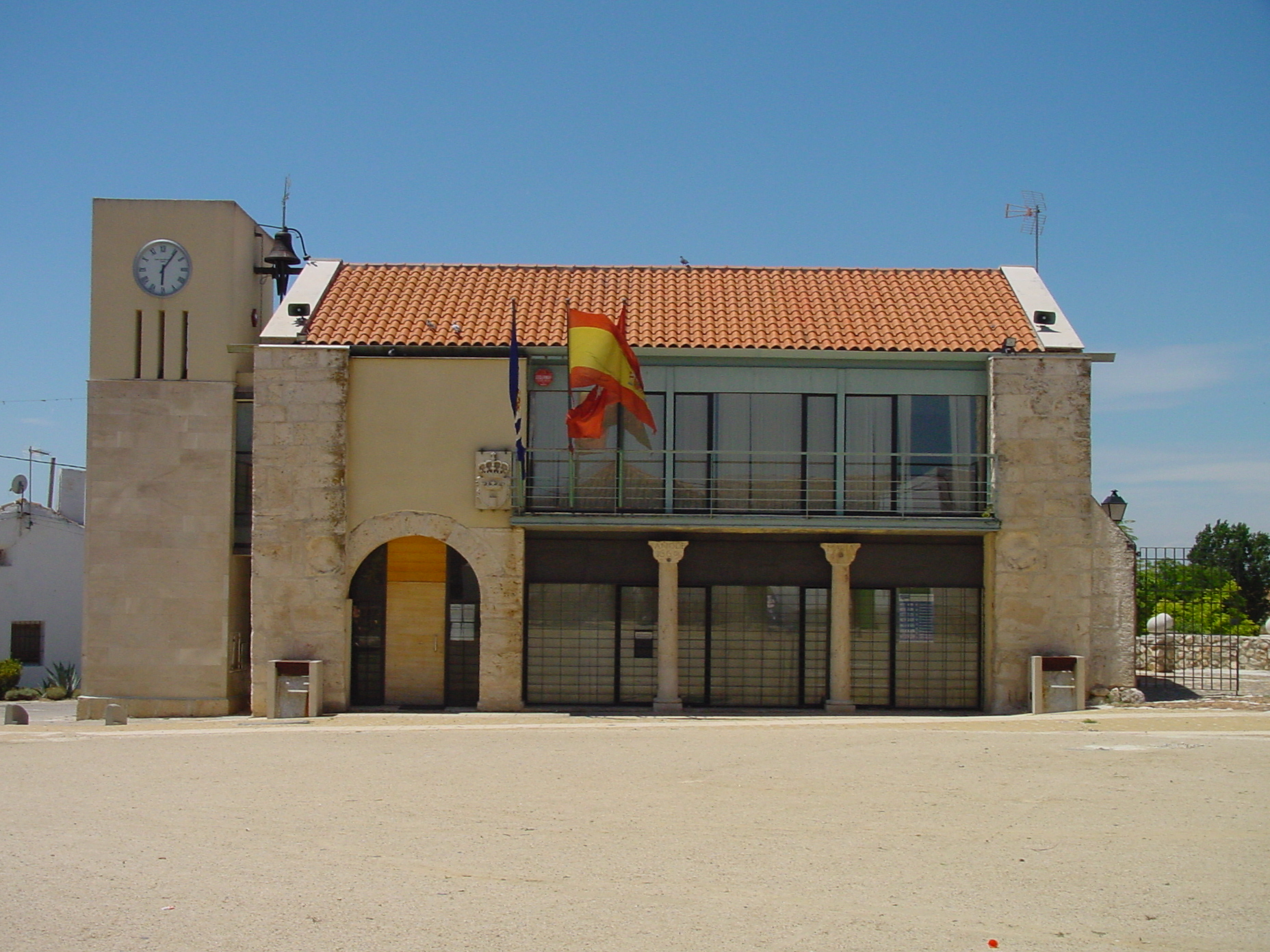 Ayuntamiento de Pozuelo del Rey.